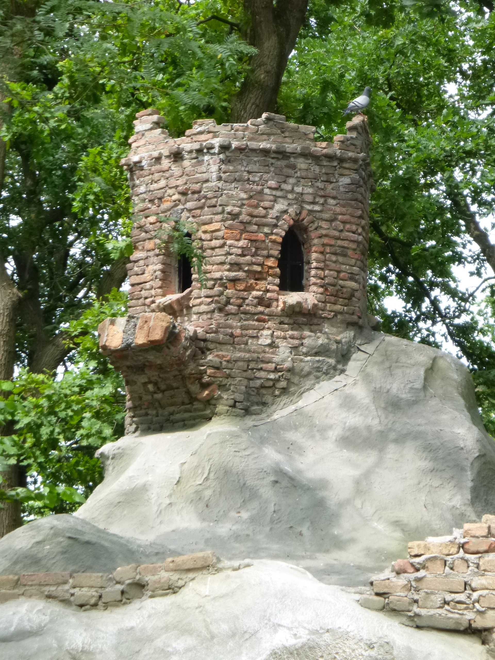 Le conte "La robe de mariée de Geneviève" à Efteling